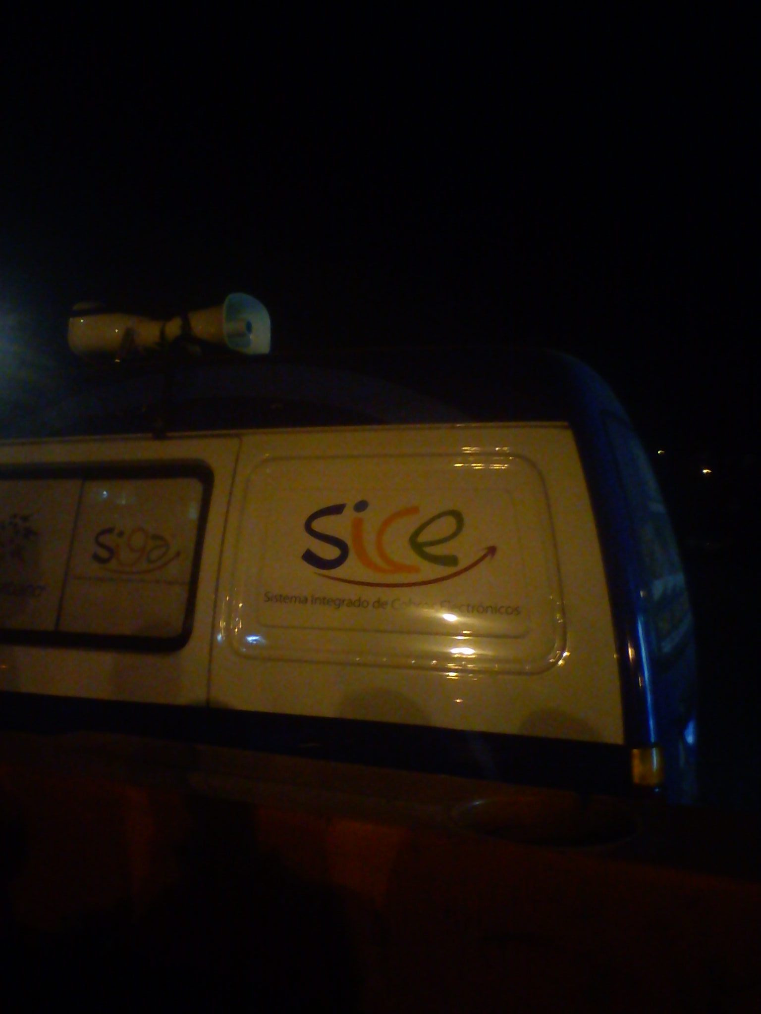 Unidad Móvil del Sistema Integrado de Cobros Electrónicos, Guatemala.